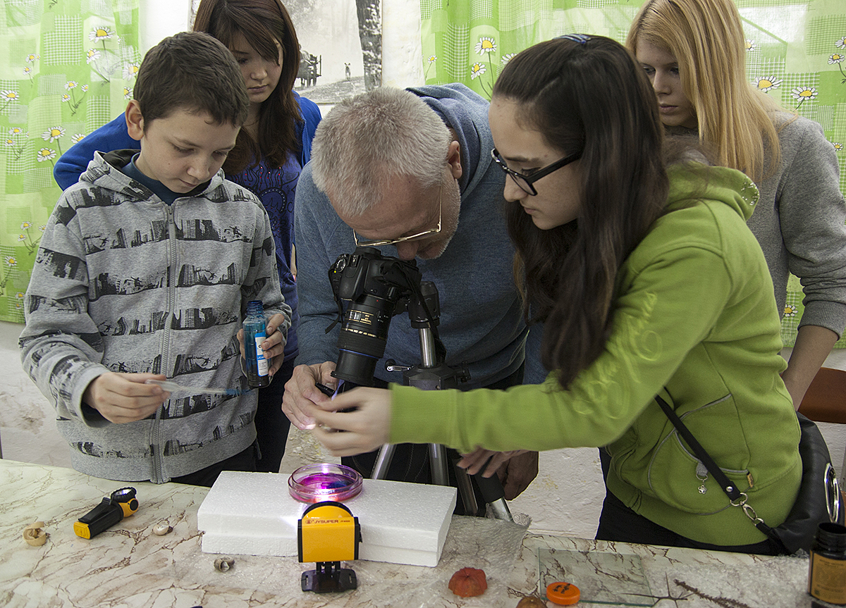 Проект Вінниця крізь призму об'єктива. Фотошкола для молоді